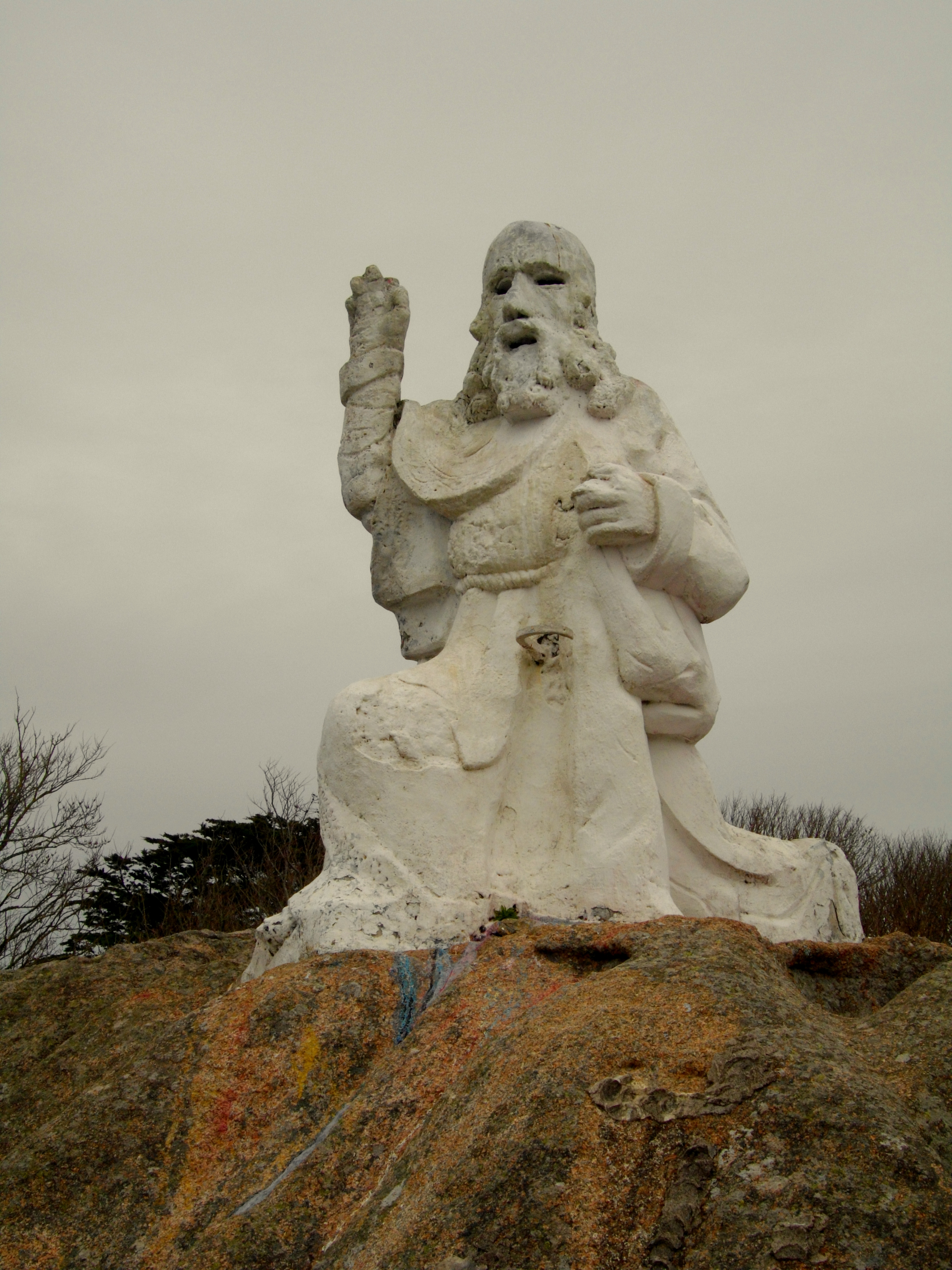 La statue du Père Eternel